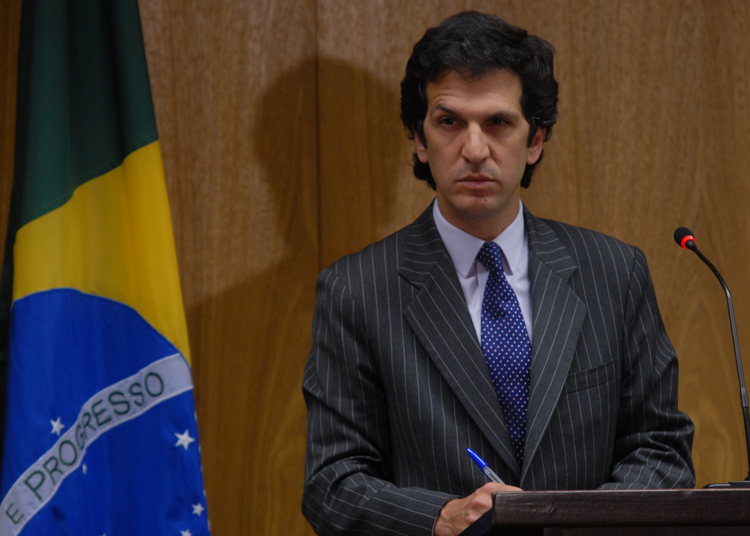 El ministro de relaciones exteriores Jaime Bermúdez Merizalde en visita a Brasil.